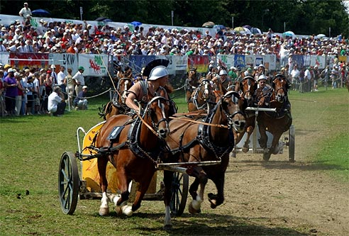 Marché-Concours 2004: Course chars romains, 2 chevaux